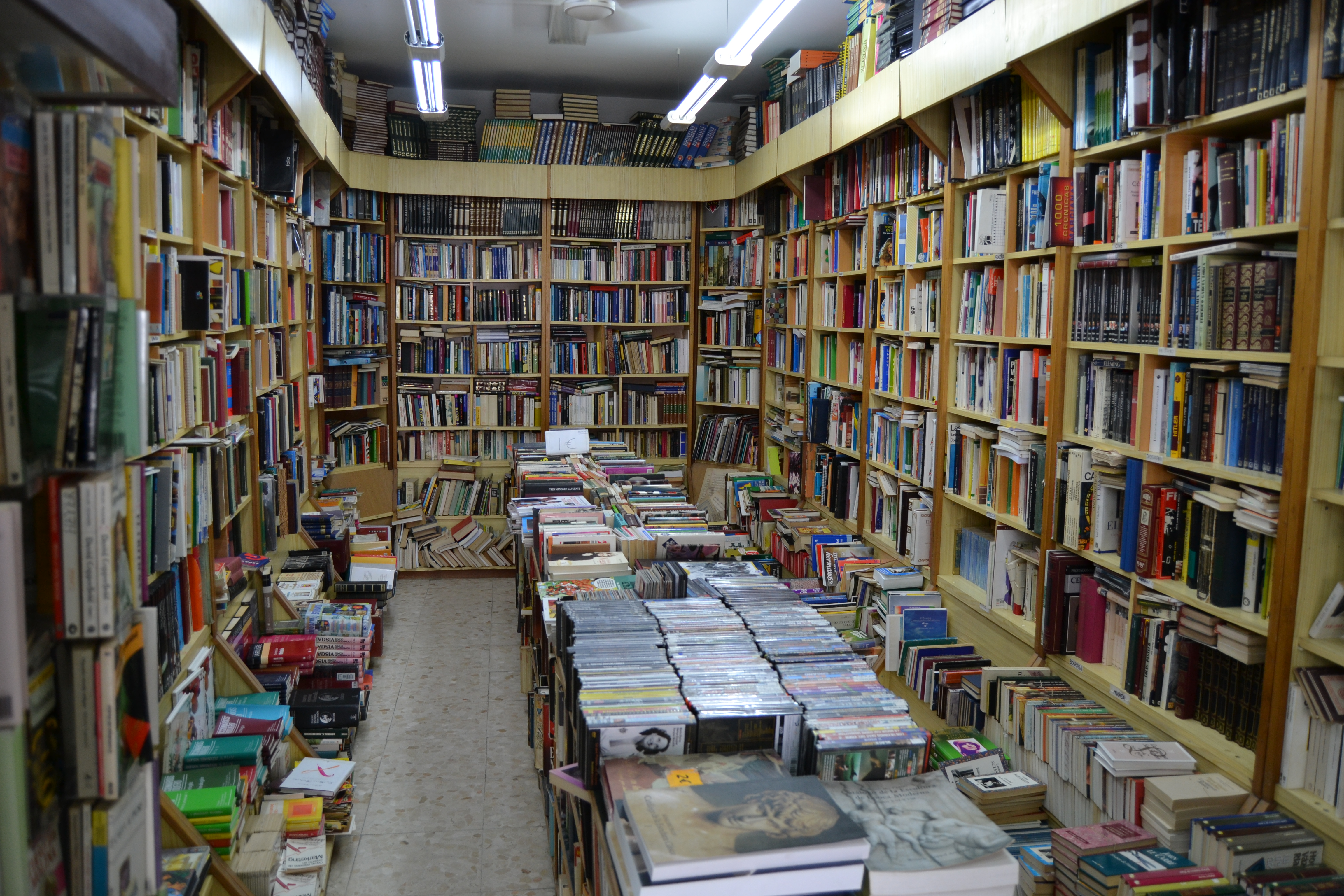 Librería Raimundo, Cádiz, España. Septiembre de 2017.